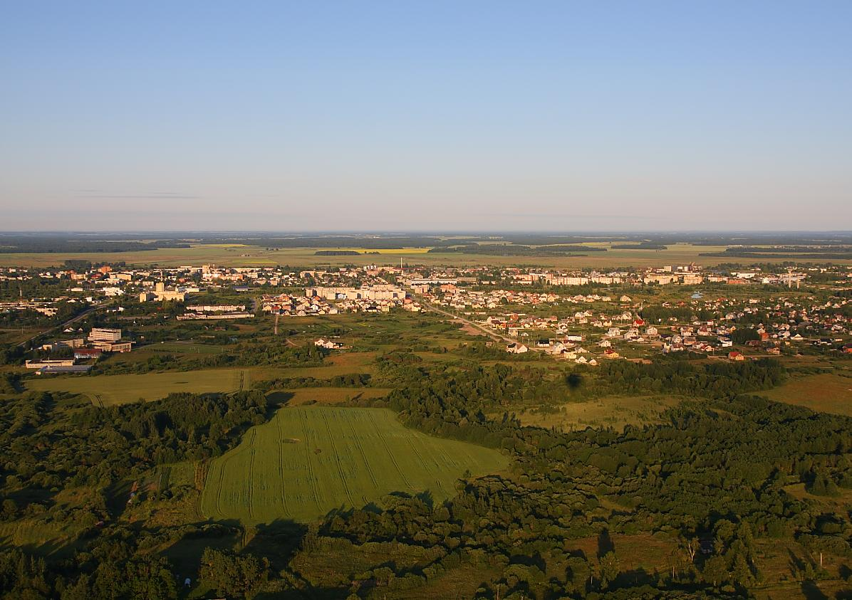 Radviliškio panorama, 2009 04 04